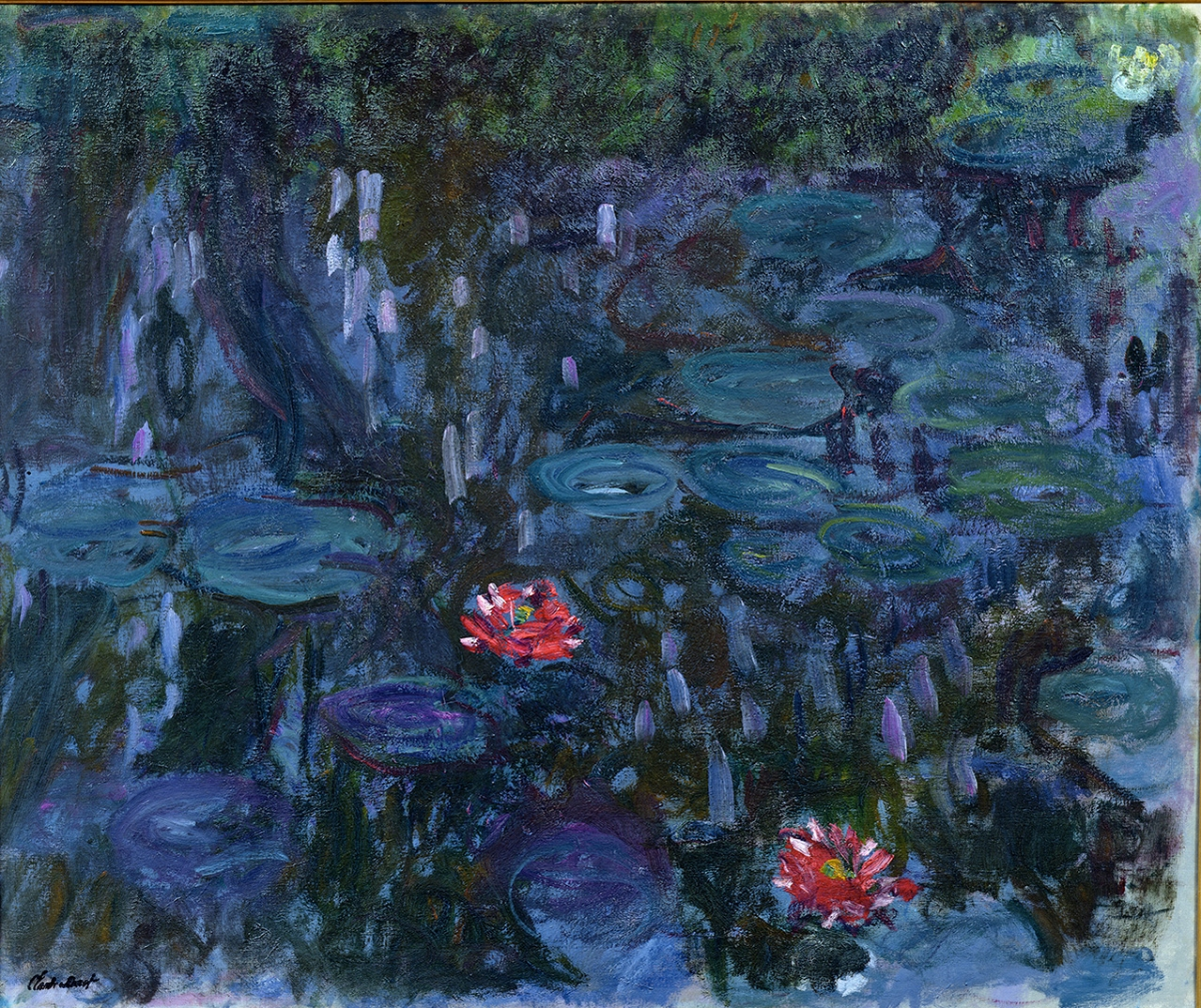 Seerosenteich, Spiegelung von Trauerweiden Öl auf Leinwand 155 x 131 cm